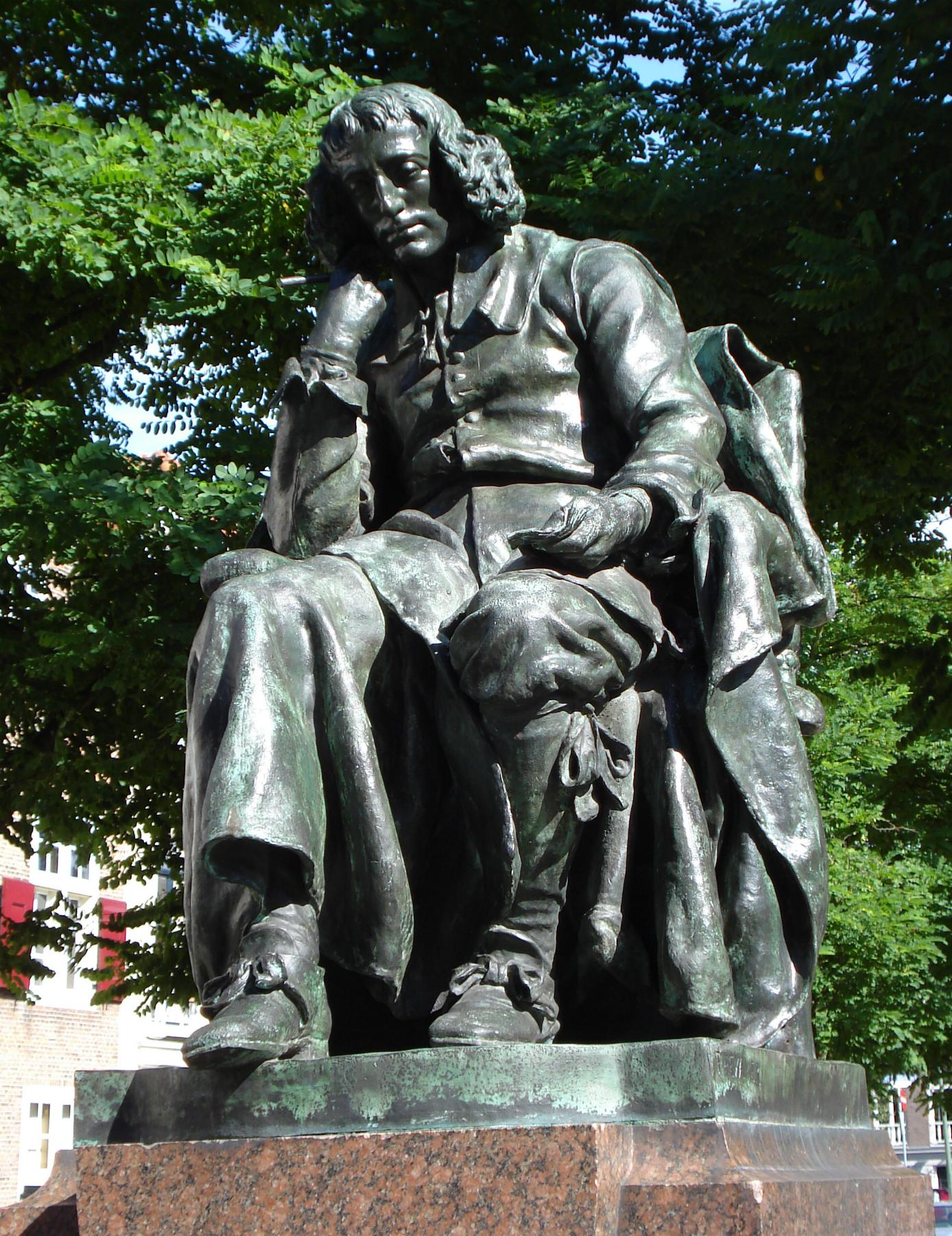 Den Haag, Paviljoensgracht. Standbeeld van Spinoza door Frédéric Hexamer. Den Haag/The Netherlands.